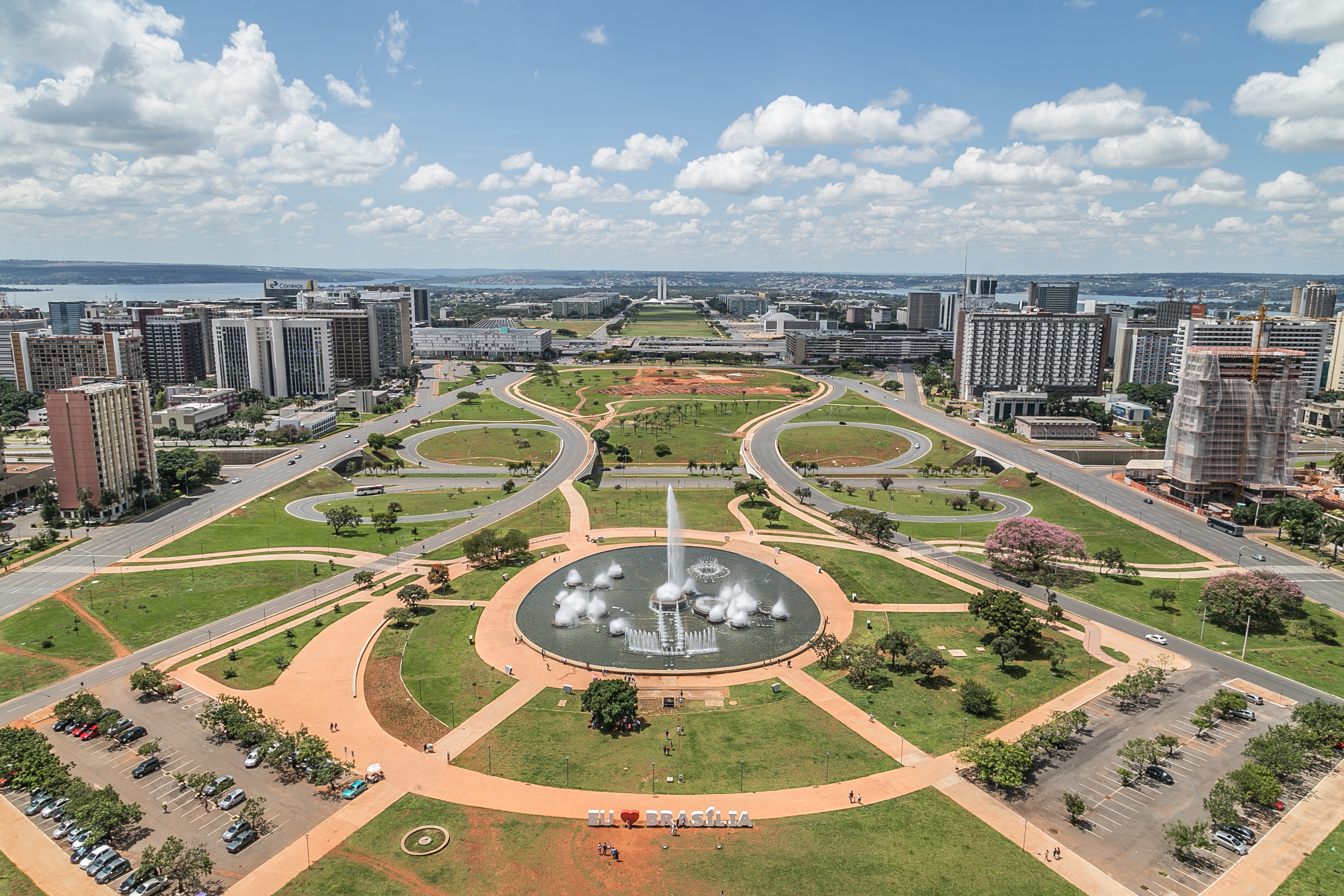 Conjunto urbanístico de Brasília construído em decorrência do Plano Piloto traçado para a cidade